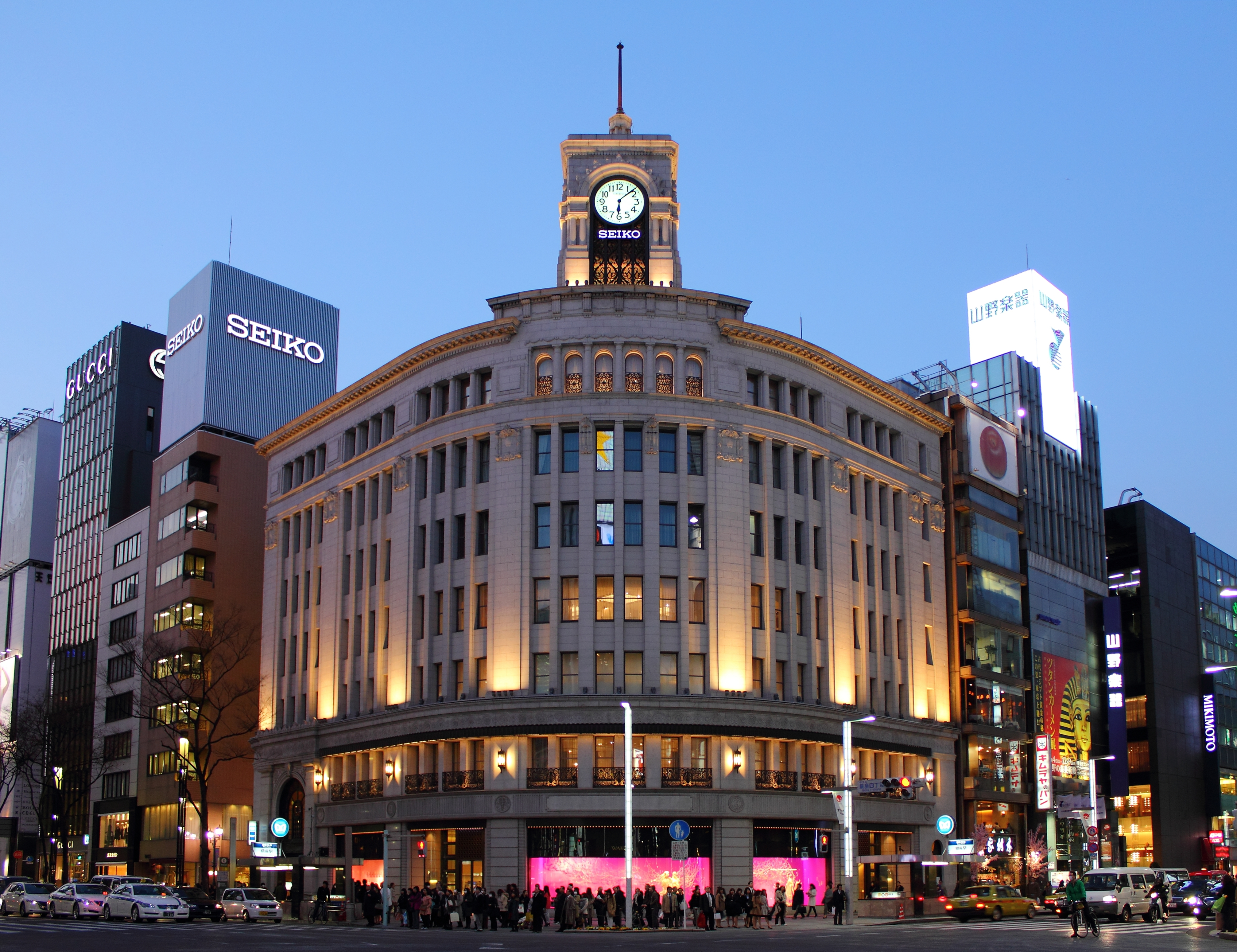 銀座和光（東京都中央区）